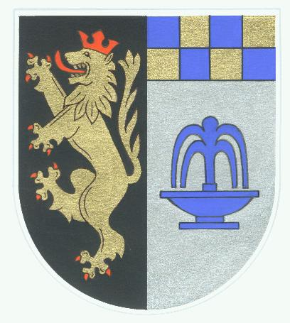 Wappen von Maisborn